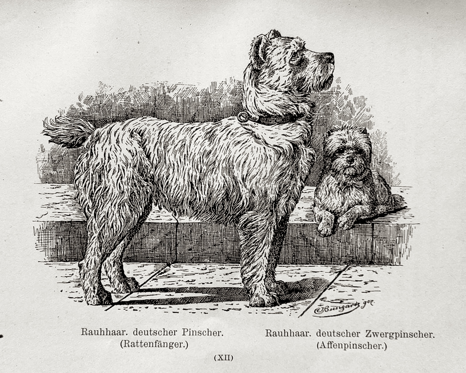 rauhaariger pinscher Zeichnung 1884